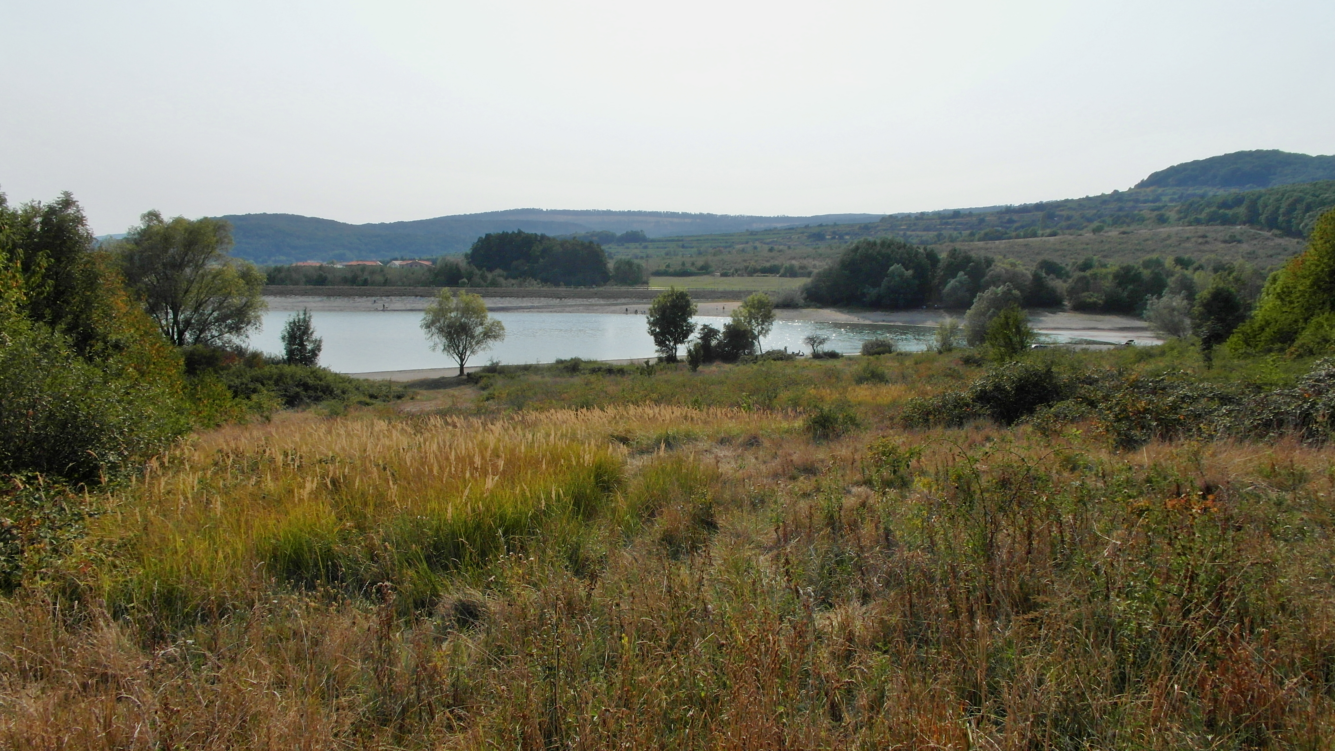 ZA PRIEHRADOU